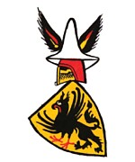 Familienwappen Wildenberg und Greifenstein